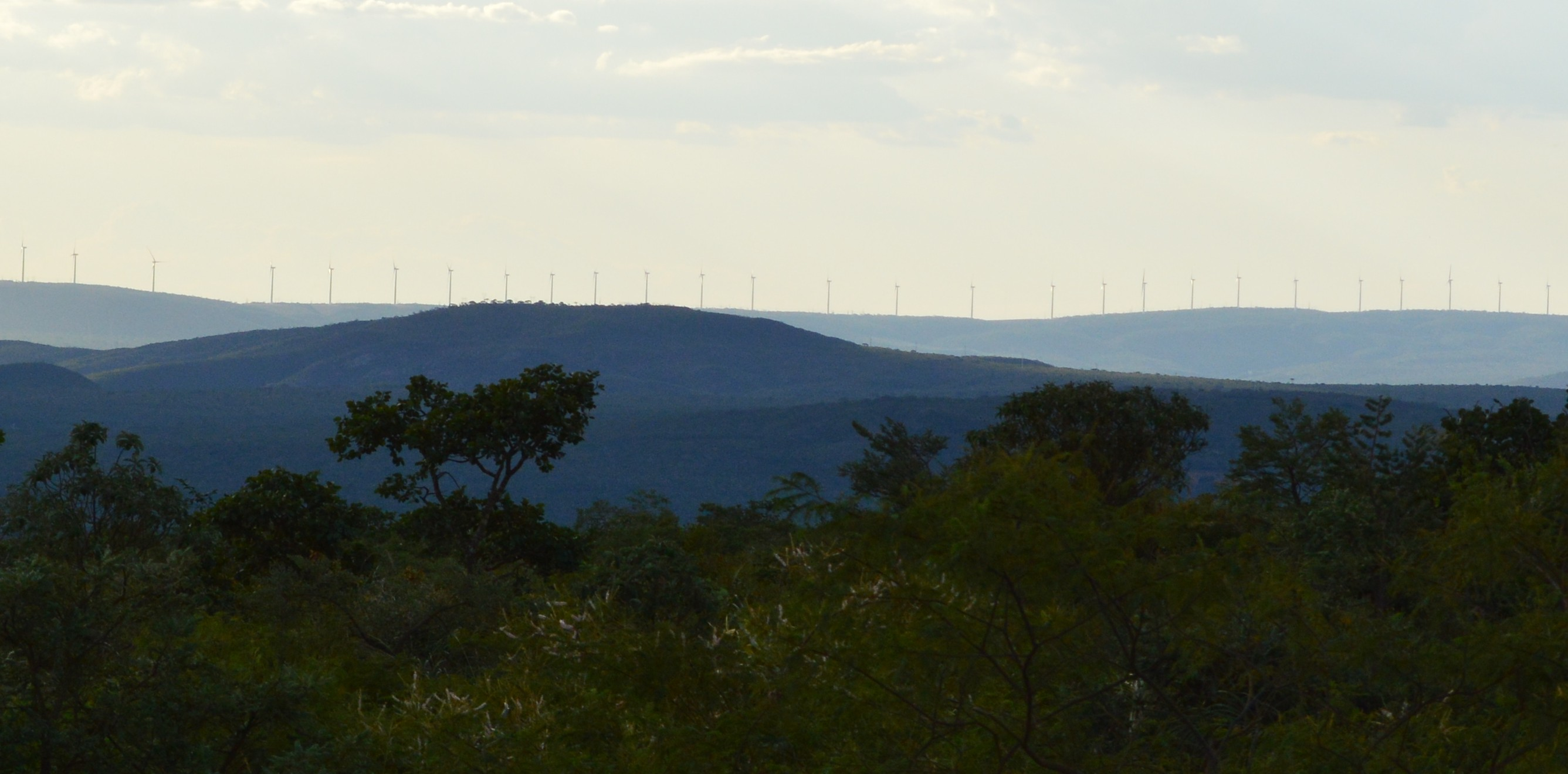 Vista panorâmica do Parque Eólico Alto Sertão, Caetité, Bahia, 2016